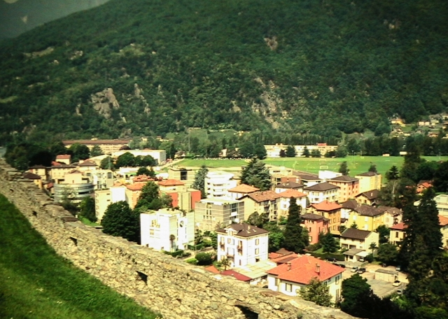 Fotis: Ella Strug, 19-24/5/2005. Donis permeson por kopii la diapozitivon por publikigo en Vikipedio al Biciklanto